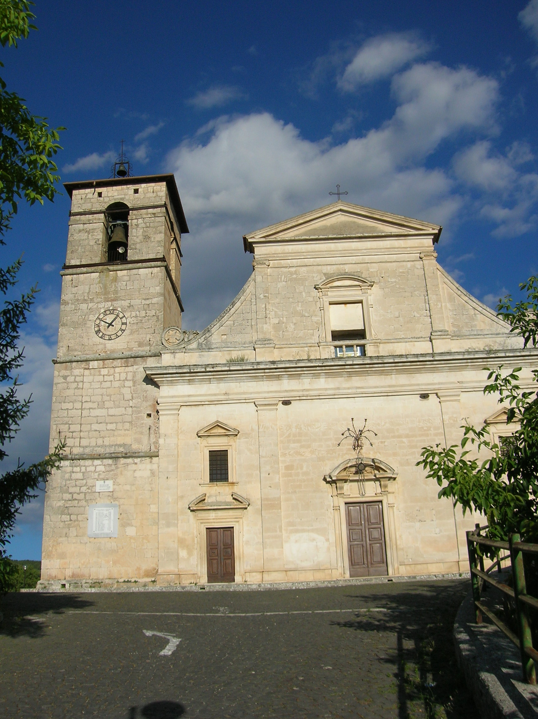 chiesa poggio picenze (ritoccata)